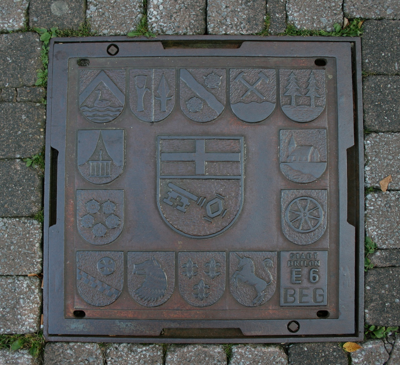 Rechteckiger Schachtdeckel mit Wappenabbildung Brilon (mittig) und einiger Briloner Ortsteile in der Innenstadt von Brilon. Ortsteile im Uhrzeigersinn beginnend oben links: Alme, Madfeld, Rösenbeck, Messinghausen, Hoppecke, Bontkirchen, Radlinghausen, Thülen, Nehden, Wülfte, Altenbüren, Rixen, Scharfenberg.